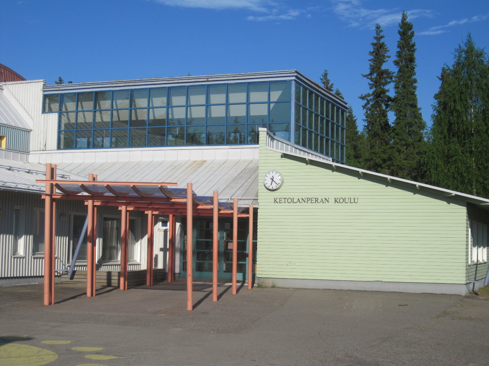 Kempeleen Ketolanperän kylässä sijaitsevan Ketolanperän koulun sisäänkäynti.